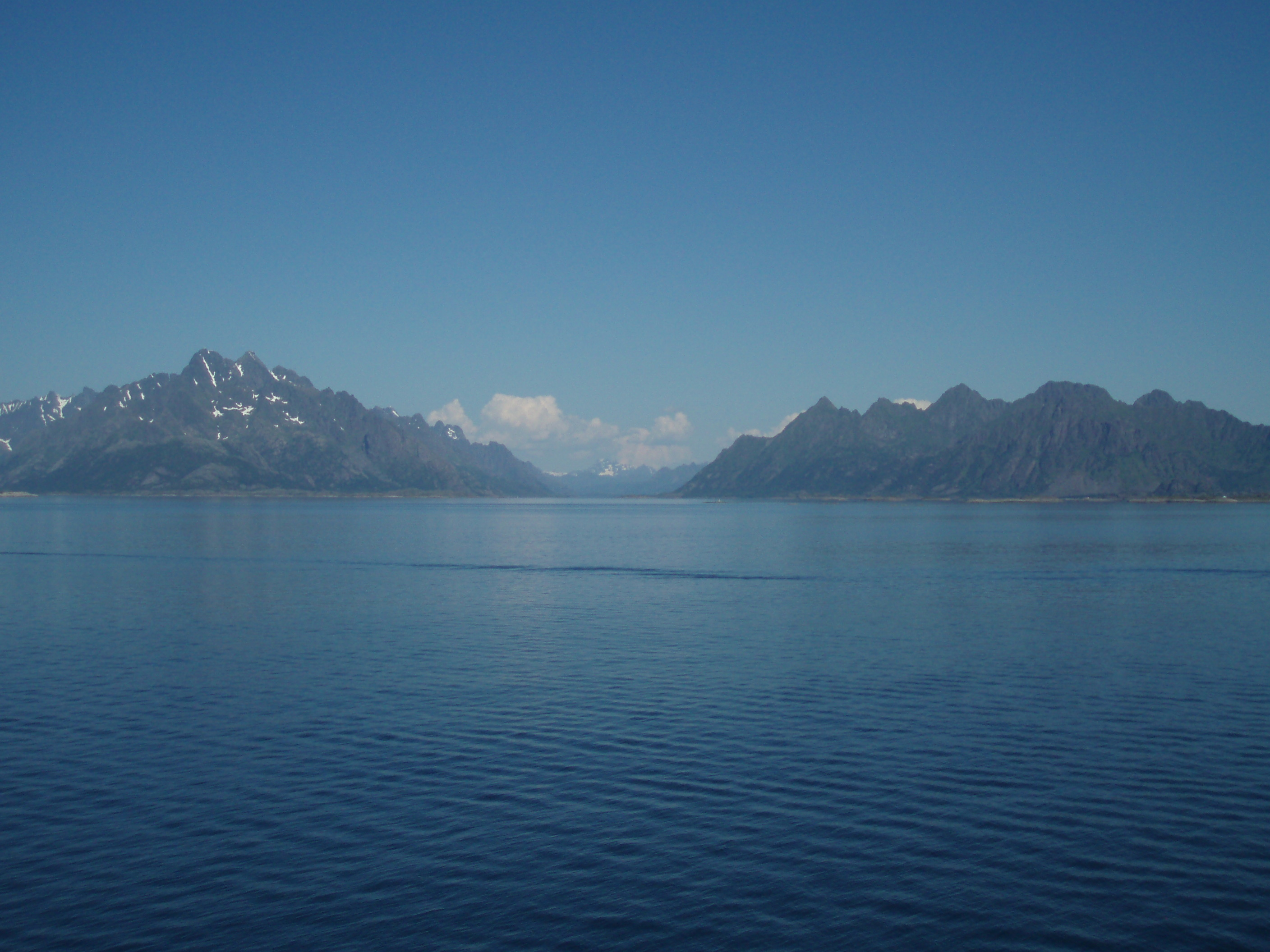 Austnesfjorden seen northwards, near Svolvær.